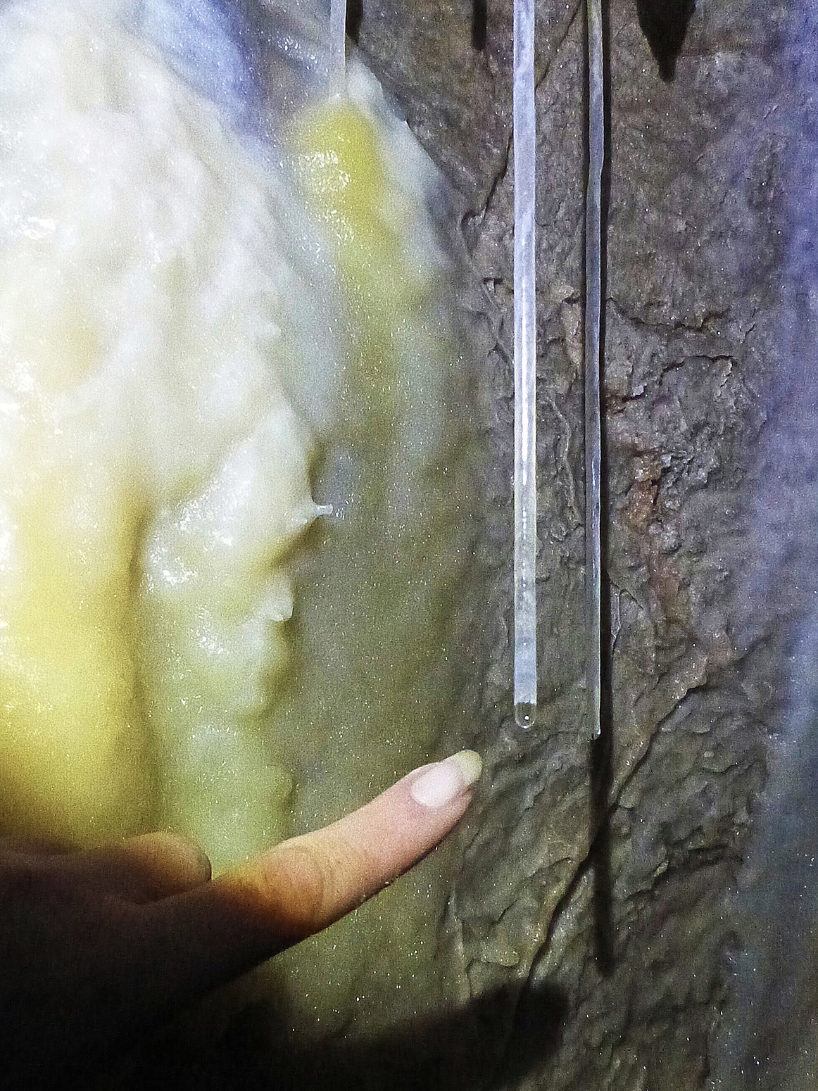 Parte di una colata calcitica sulla parete e una cannula appesa alla volta di una grotta